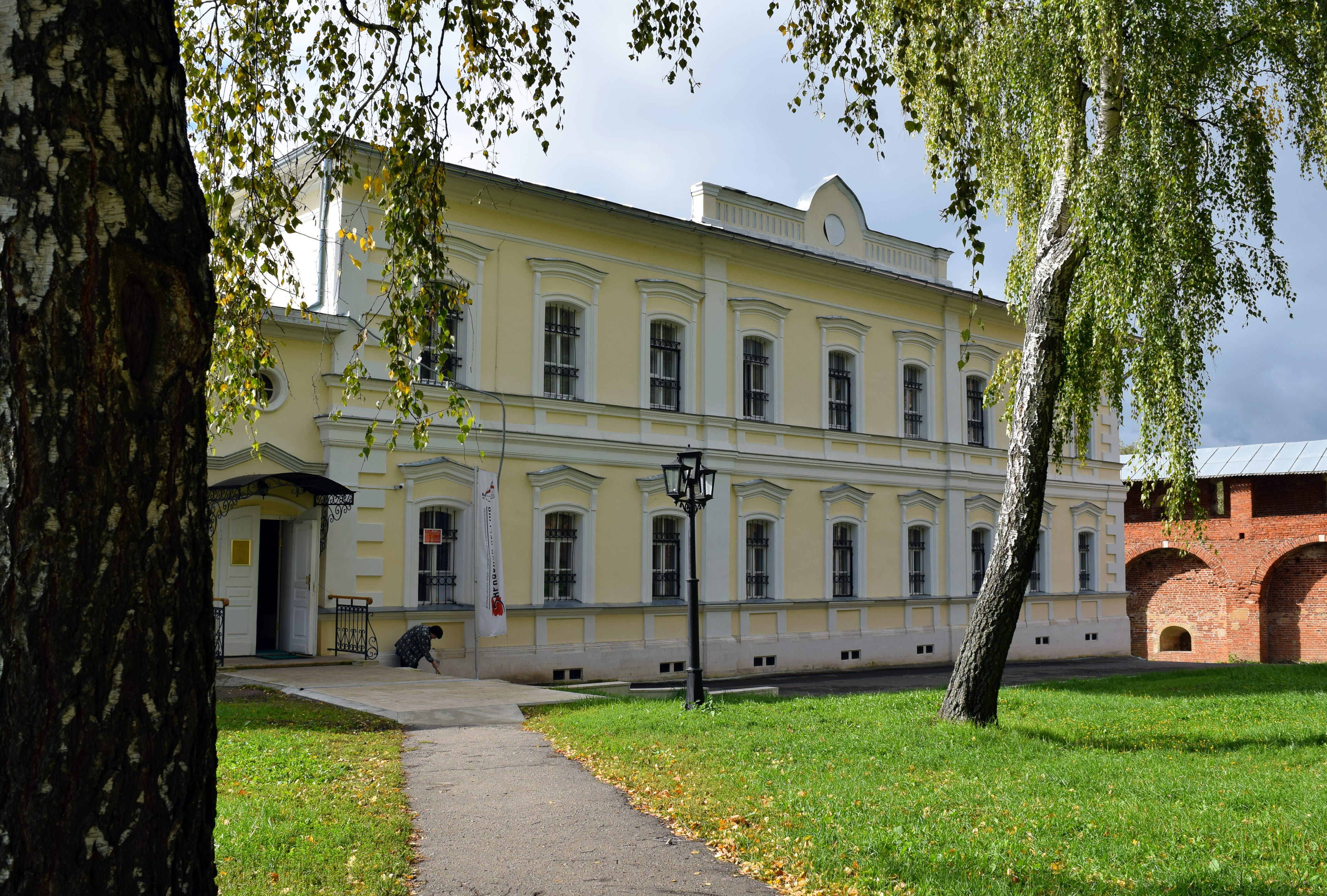 В настоящее время - музей "Зарайский кремль"